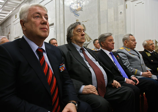 Вручение юбилейных медалей «В память 25-летия окончания боевых действий в Афганистане».